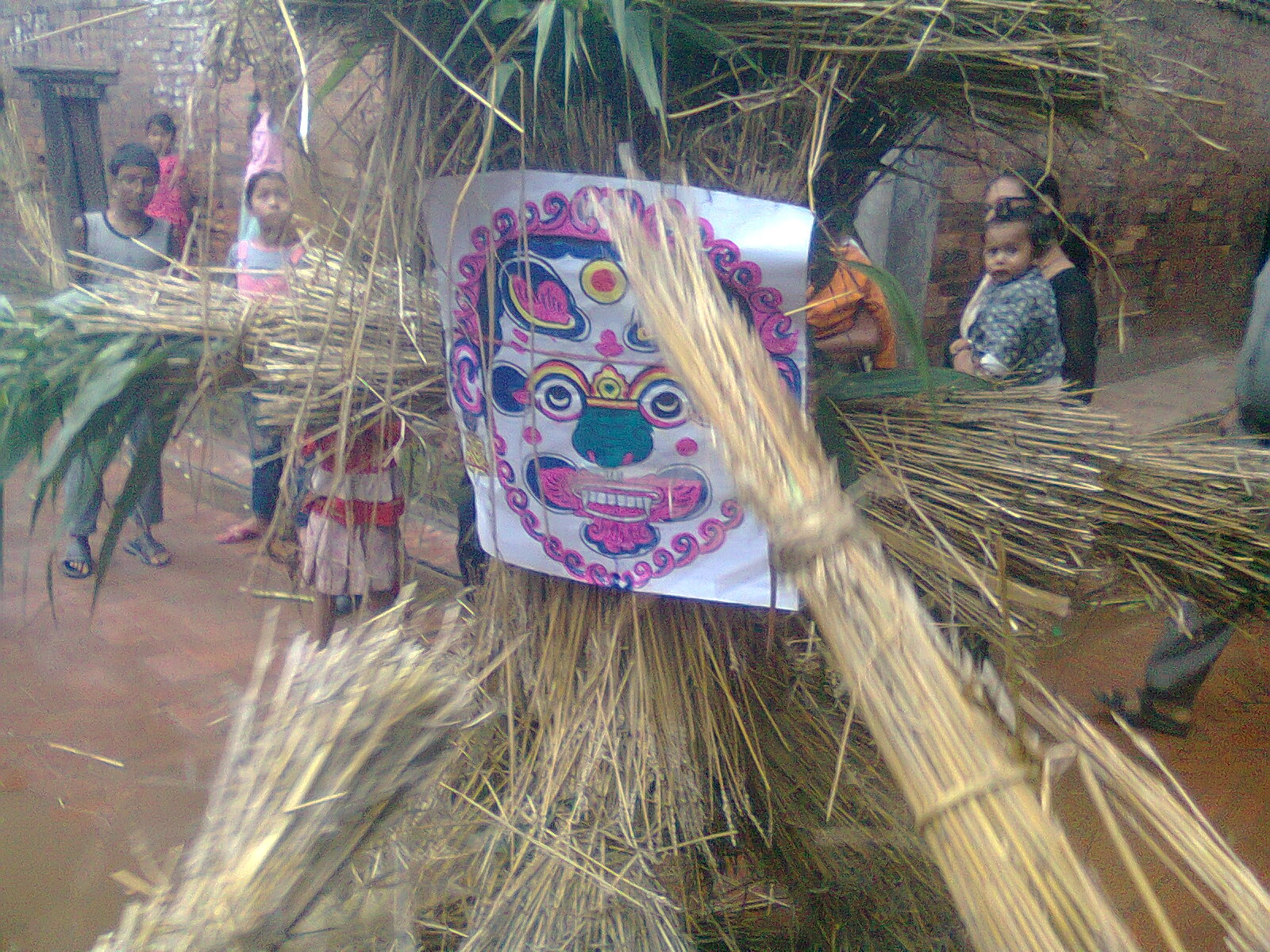 नेपाली: घण्टाकर्ण